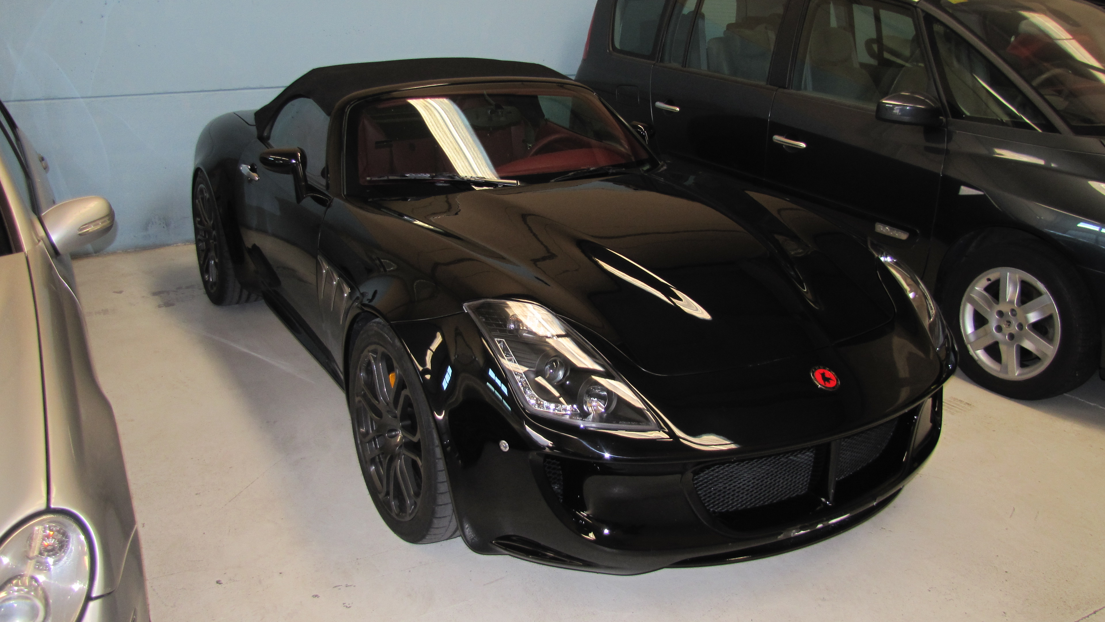 Automóvil deportivo Tauro Sport Auto Spider V8 negro